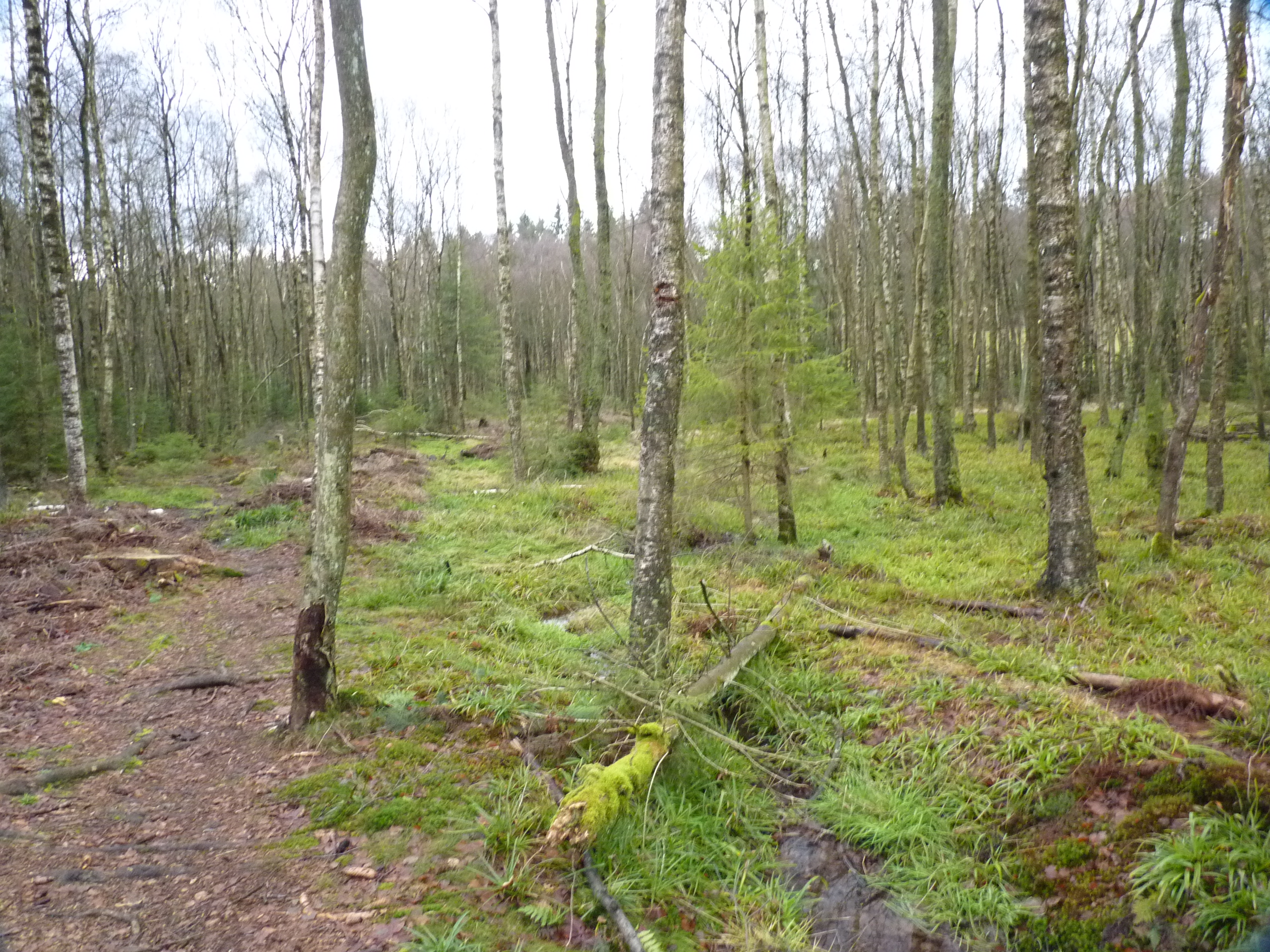 Pfade durch das Ederquellgebiet im Winter 2013